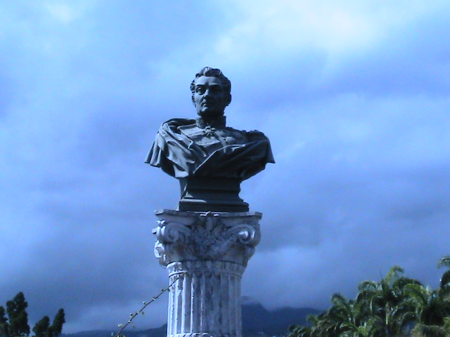 Buste de Bailly Gédéon de Monthion